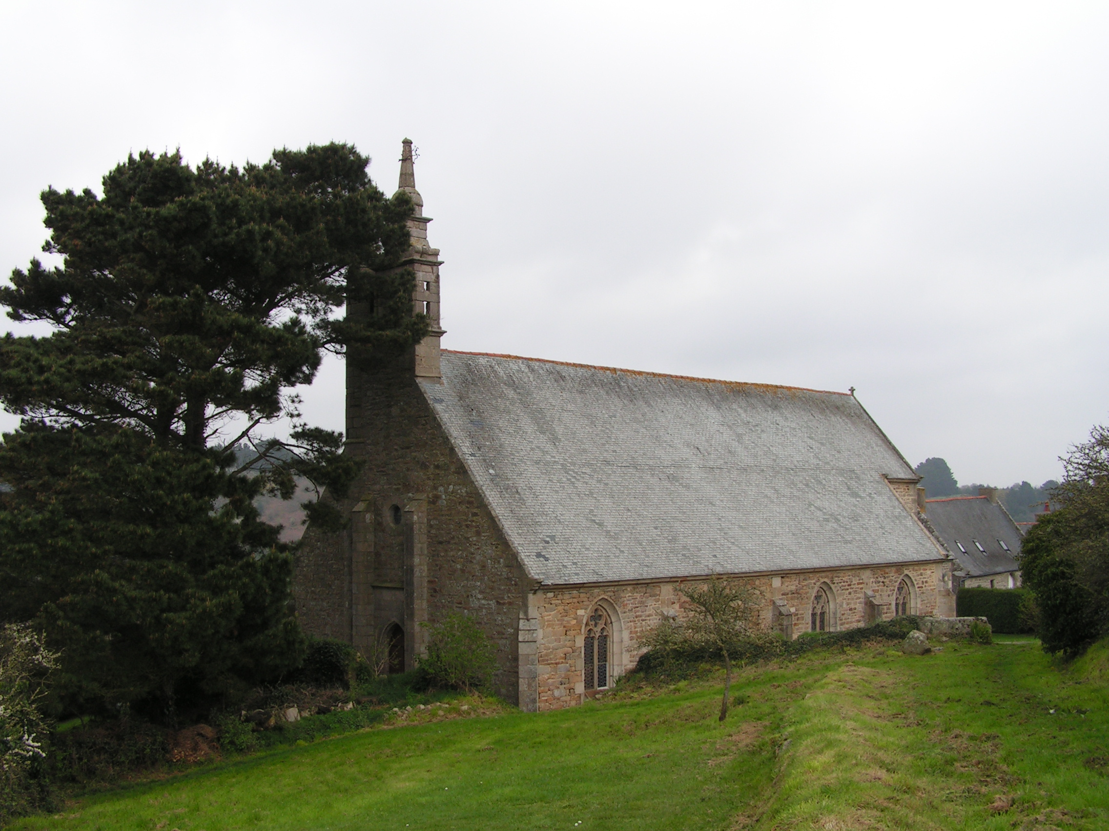 Chapelle Notre-Dame du Yaudet, à proximité de l'estuaire du Léguer.